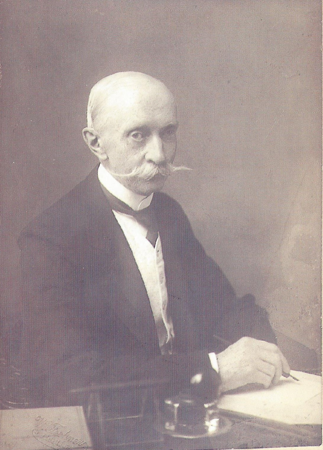 Porträtfotografie von Robert Hue de Grais